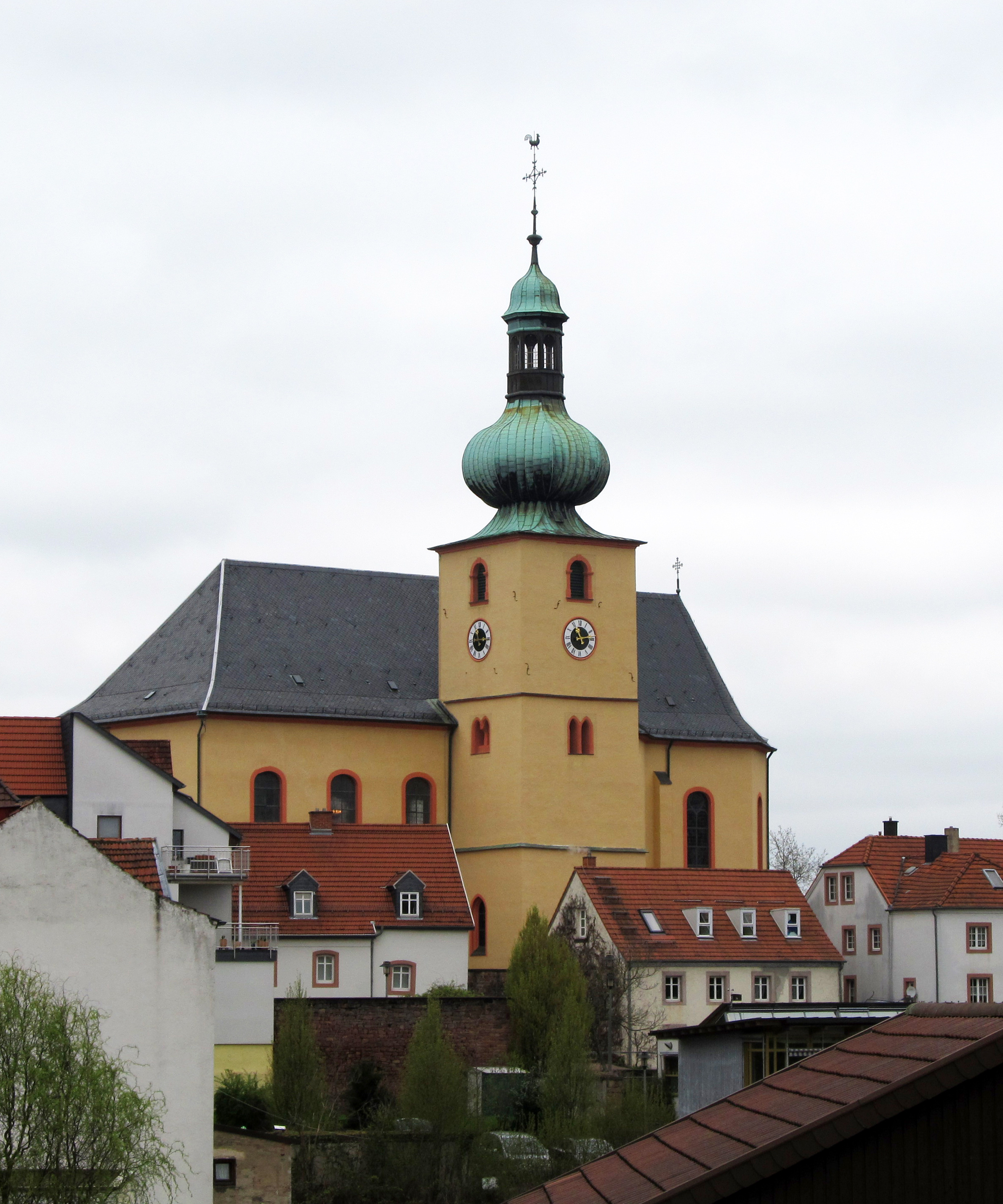 Die katholische Pfarrkirche St. Stephan in Illingen, Saarland